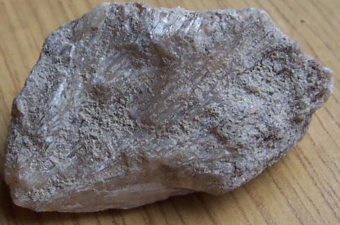 minerał; colemanit; pochodzenie Turcja; autor zdjęcia Sebastian Socha; 05.08.2006r.